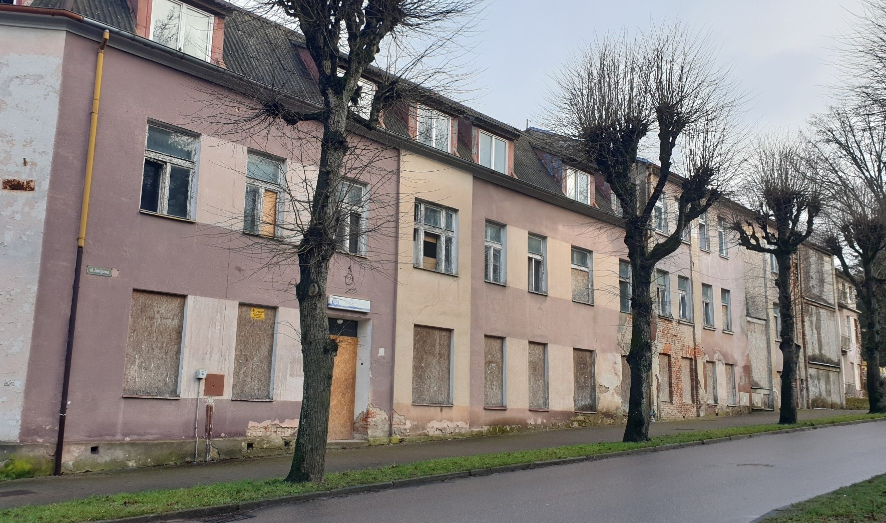 Połczyn - Zdrój, 2019. Były budynek Levych